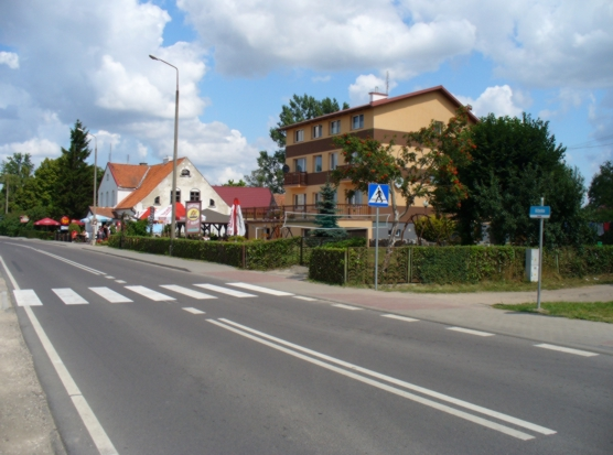 Ogonki k. Węgorzewa